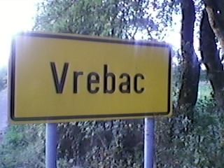 Табла на улазу у Вребац